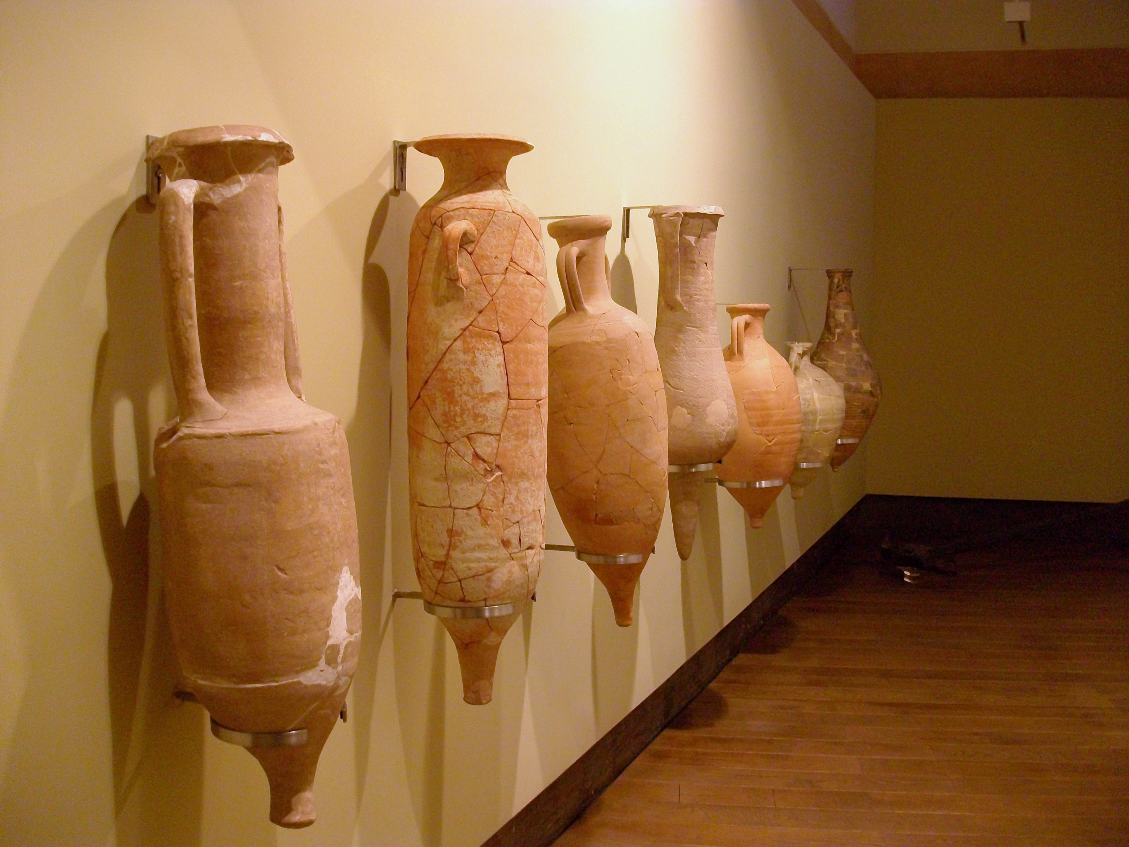 Àmfores al Museu Històric de Sagunt (MUHSAG).